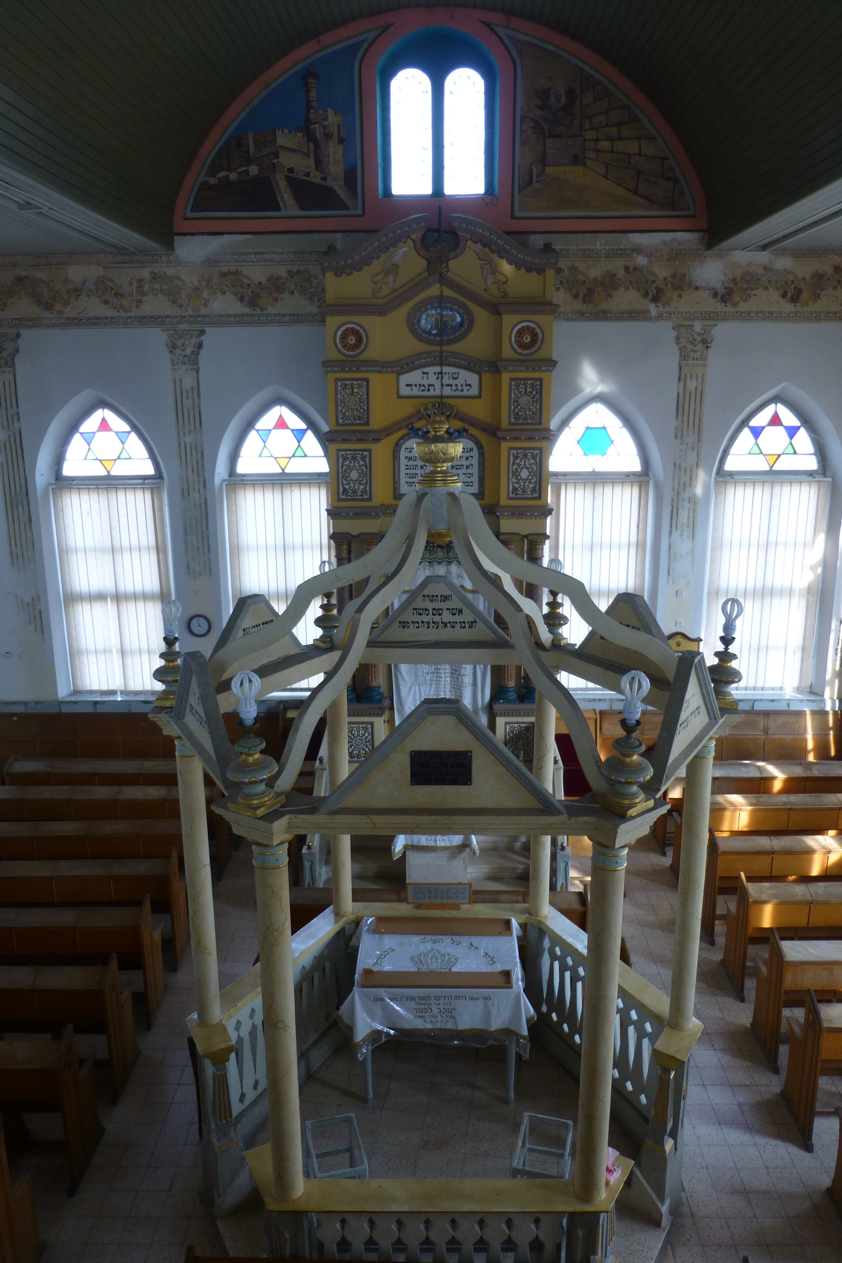 נוסד על ידי ראובן לרר ושימש בעבר כבית ספר, בית כנסת, בית ההגנה והיה המרכז הקהילתי הראשון למושבה נס ציונה. כיום משמש כמוזיאון בית ראשונים.